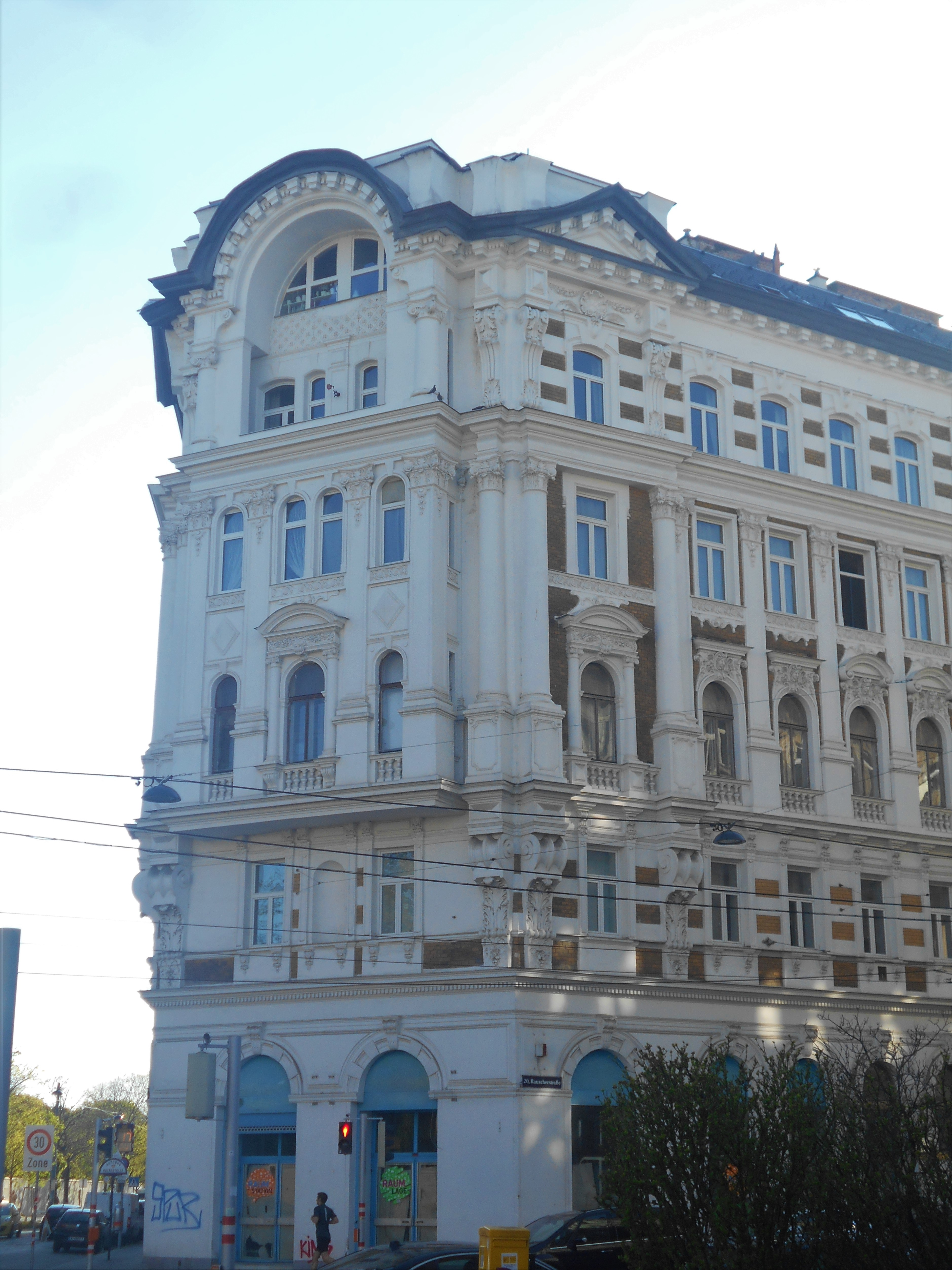 Wohnhaus Rauscherstraße 14 (ident Wasnergasse 45)